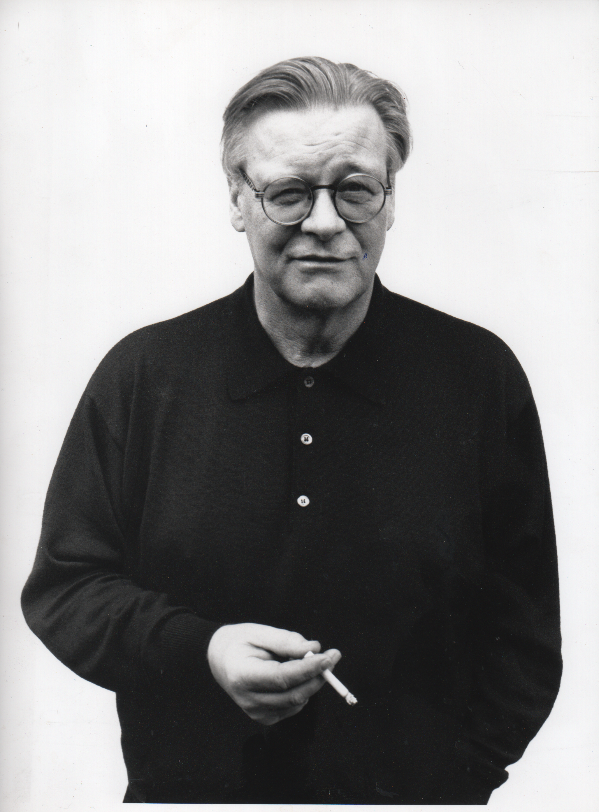 Jack Gadellaa